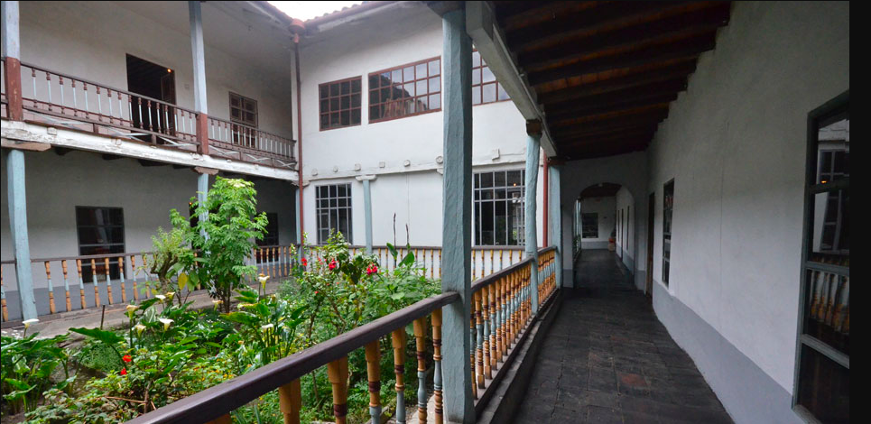 Jardín Interno del Museo